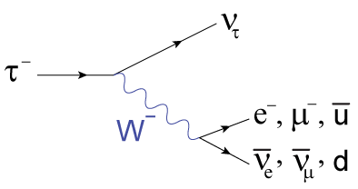 распад тау-лептона